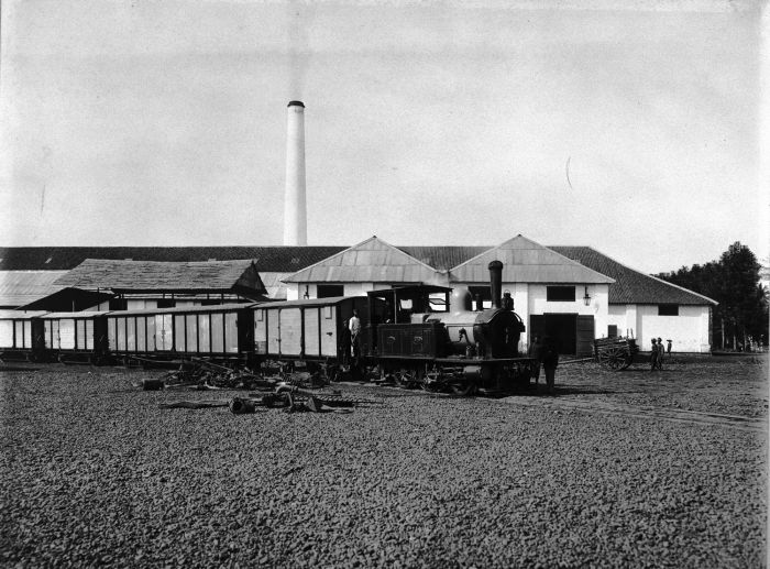 COLLECTIE TROPENMUSEUM De stoomtram met locomotief staat klaar voor het suikertransport op de suikeronderneming Kalibagor. Op de voorgrond ligt een deel van het oud ijzer klaar om opgeladen te worden. TMnr Serajoedal Stoomtram Maatschappij - Pabrik Gula Kalibagor